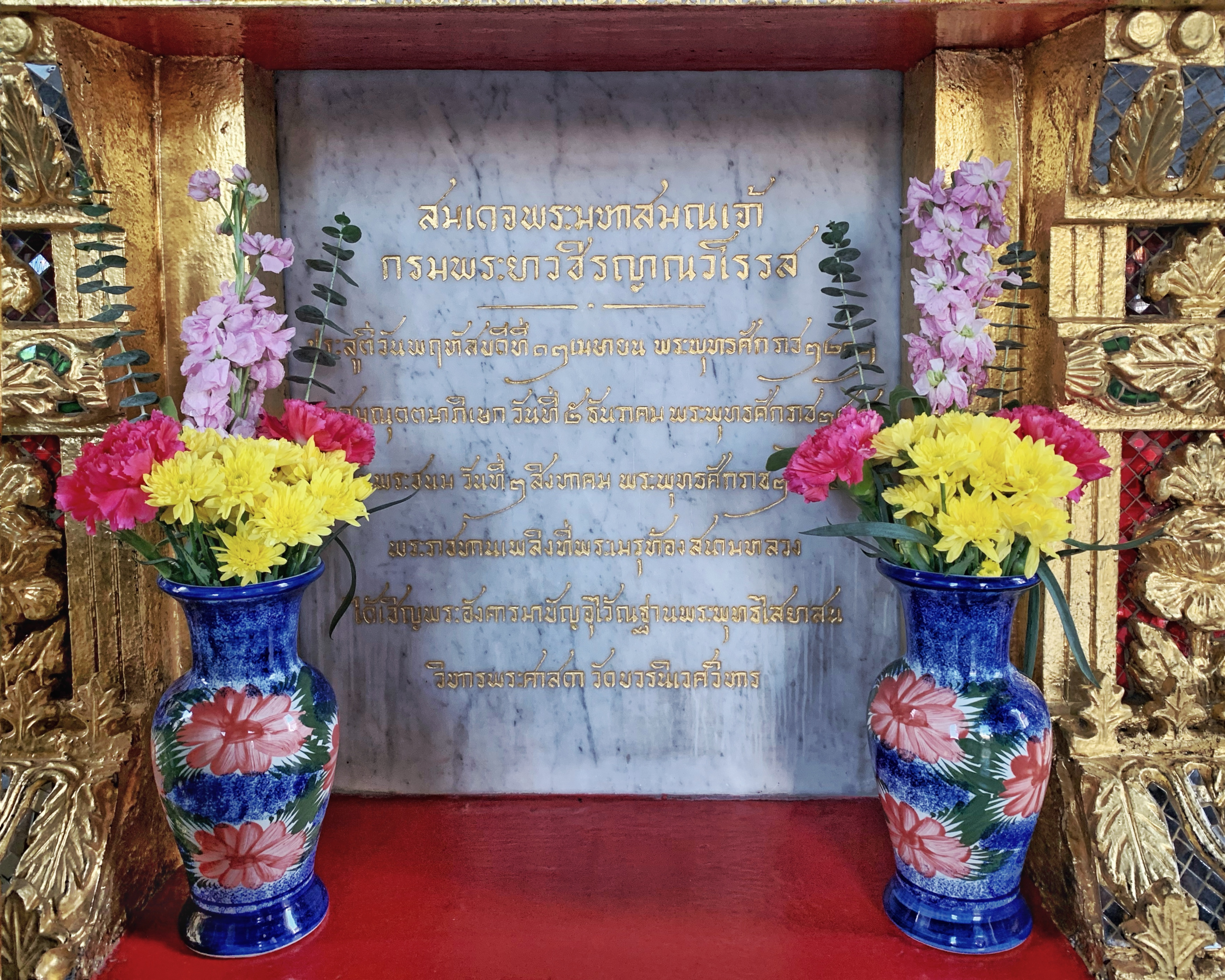 ที่ประดิษฐานพระบรมอัฐิใน สมเด็จพระมหาสมณเจ้า กรมพระยาวชิรญาณวโรรส วัดบวรนิเวศฯ